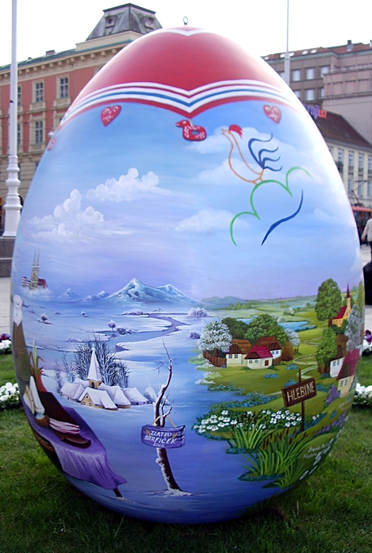 Zagrebačko uskršnje jaje na Trgu bana Jelačića